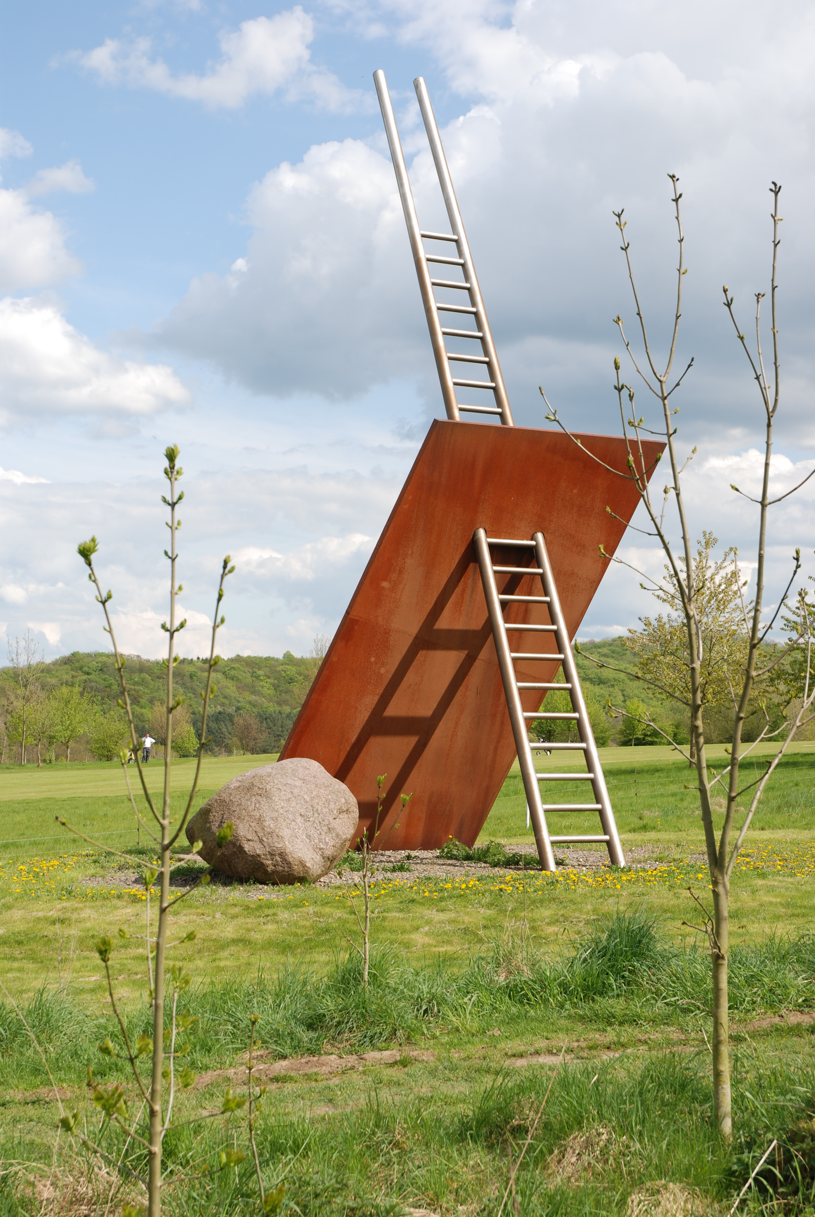 Gerd Winner: Jakobsleiter (2000). Material: Salzgitter-Stahl und V2A. Aufstellungsort: Skulpturenweg Salzgitter-Bad.